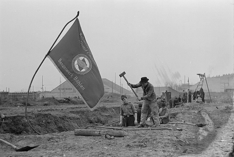 Original image description from the Deutsche FotothekArbeitseinsatz des Benzinwerks Böhlen beim Aufbau des neuen Sportforums